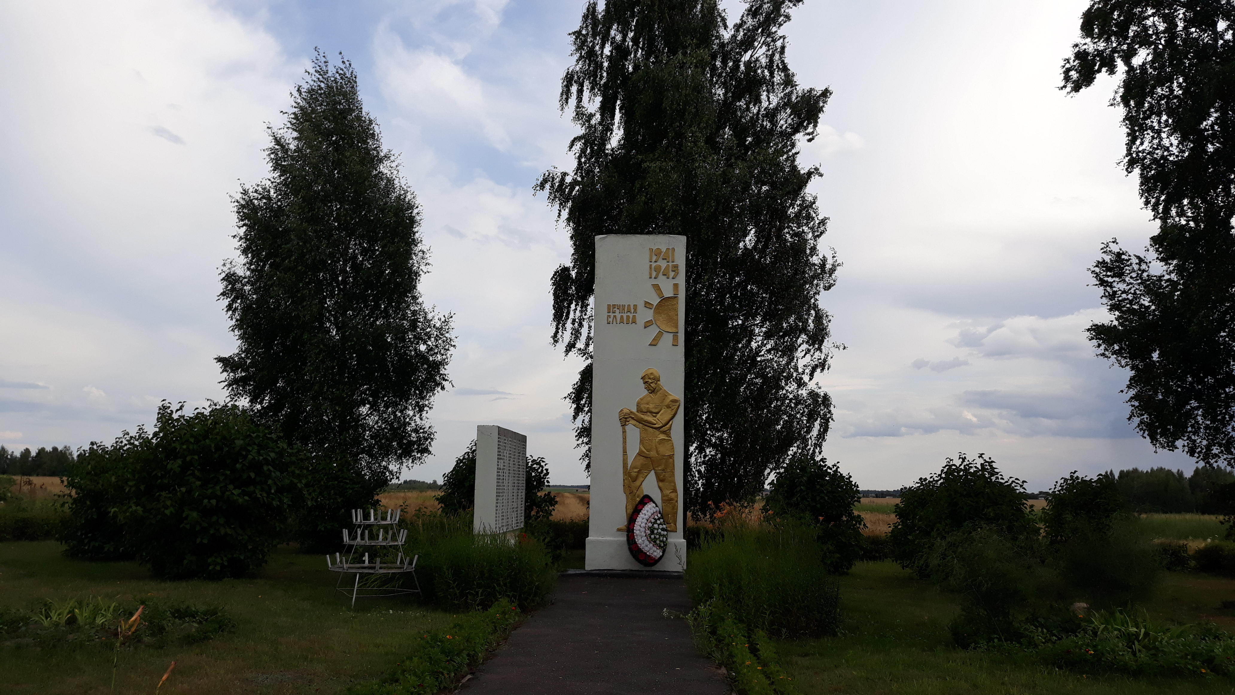 краявід вёскі